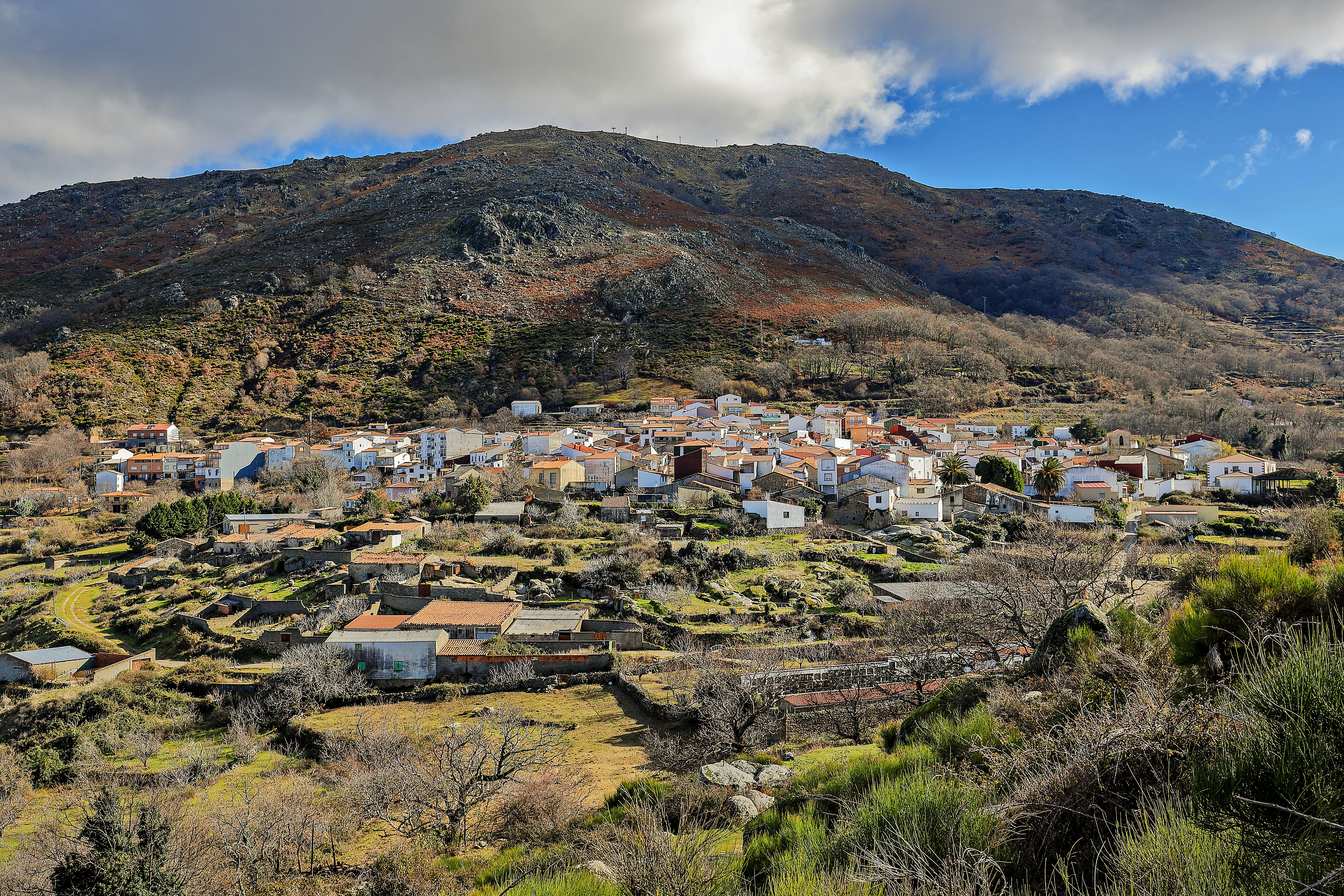 Cabezabellosa es un municipio de la comarca de Trasierra en la provincia de Cáceres.